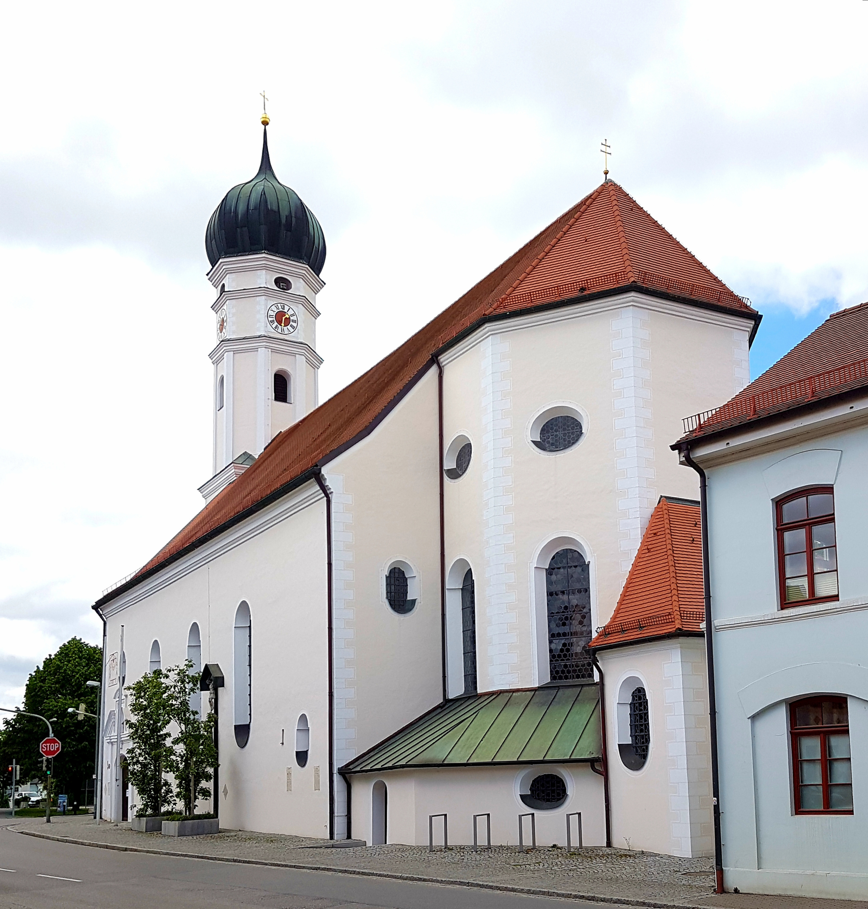 Markt Schwaben, Pfarrkirche St. Margareth